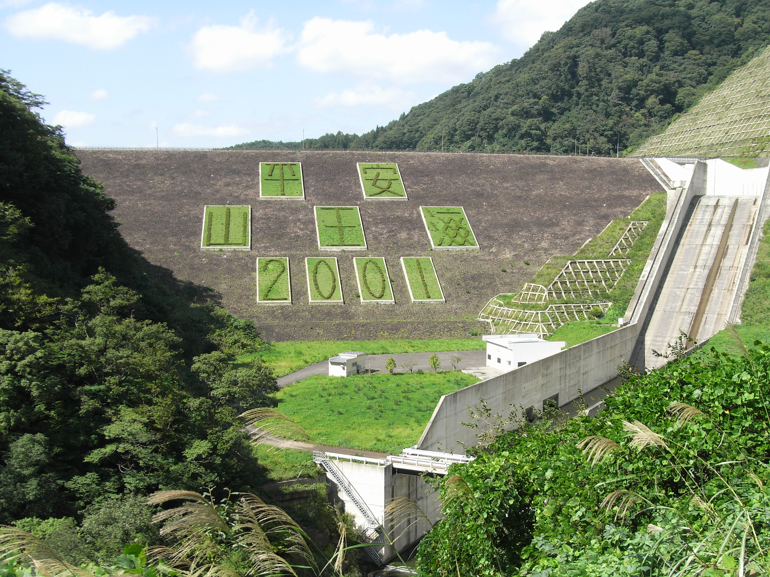 Dam